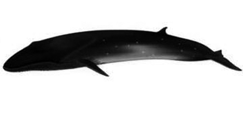 Rorcual de Bryde (Balaenoptera brydei)